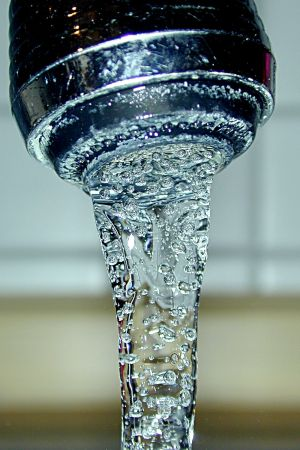 Pitná voda - kohoutek